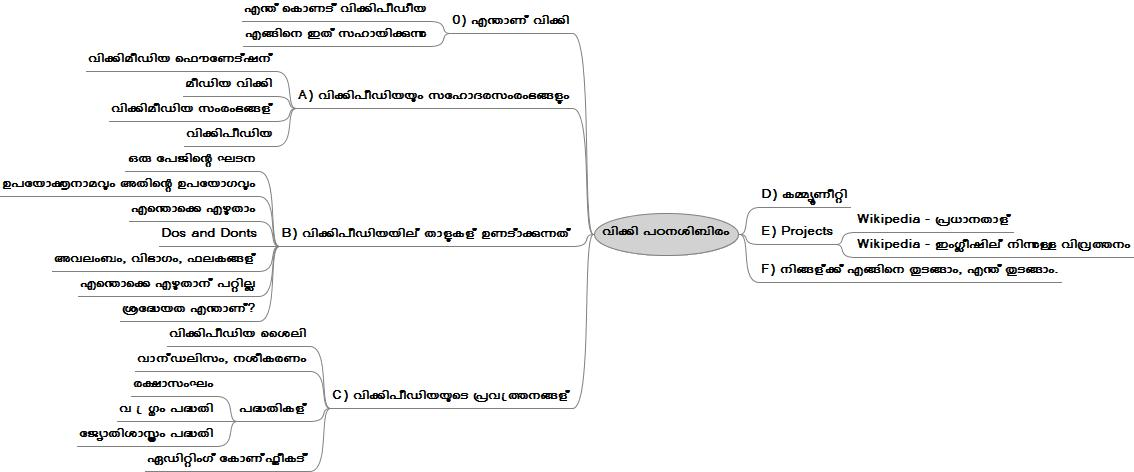 മലയാളം വിക്കി അകാദമിയുടെ ഘടന/ മൈൻ‌ഡ് മാപ്